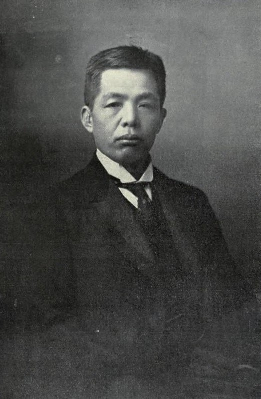 小池国三 小池国三商店(のちの山一證券)創業者